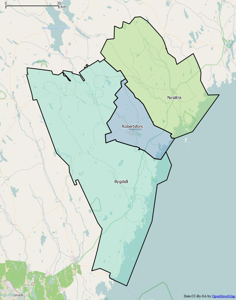 Distriktsindelningen i Robertsfors kommun World file: 165.12177601418042627 0 0 -165.12177601418042627 2245472.79096556641161442 9471650.72603393718600273